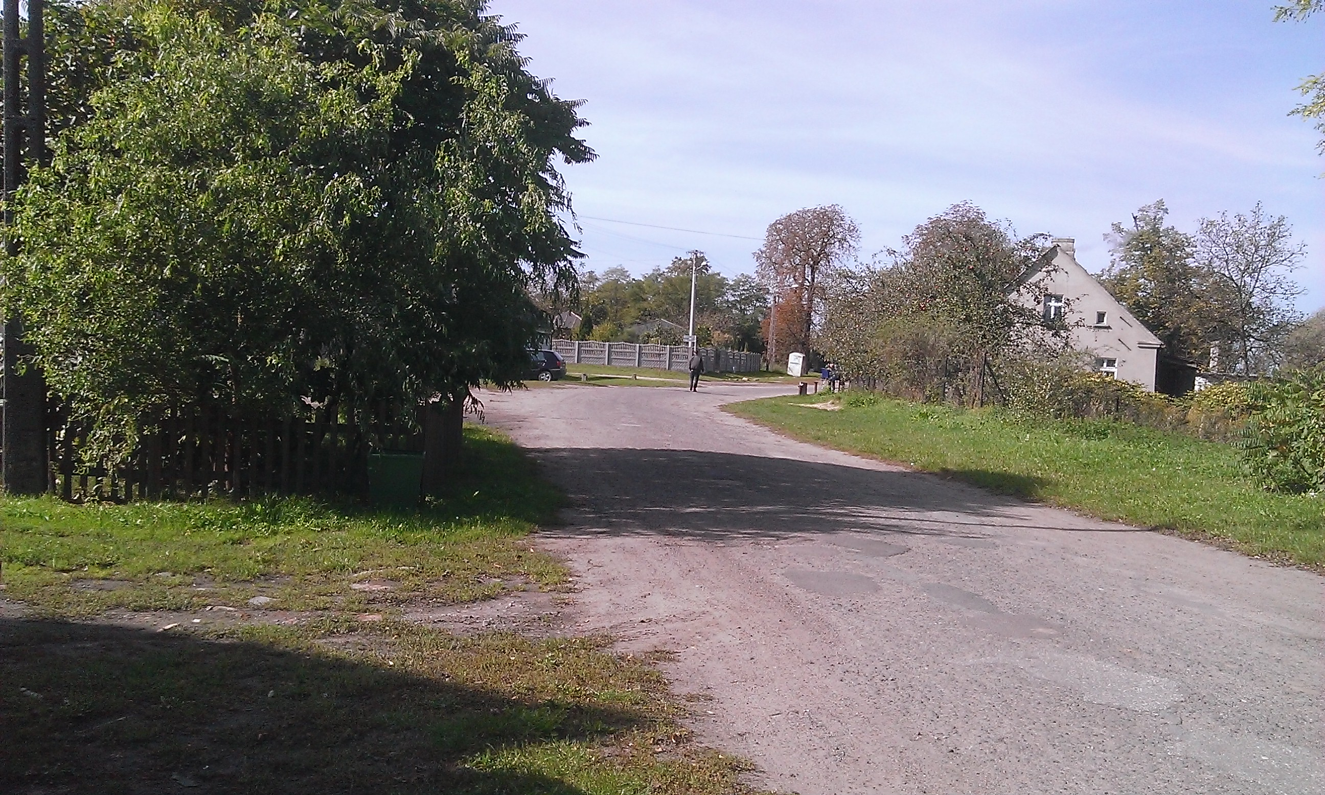 Bytyń gmina Kaźmierz 2014-09-28